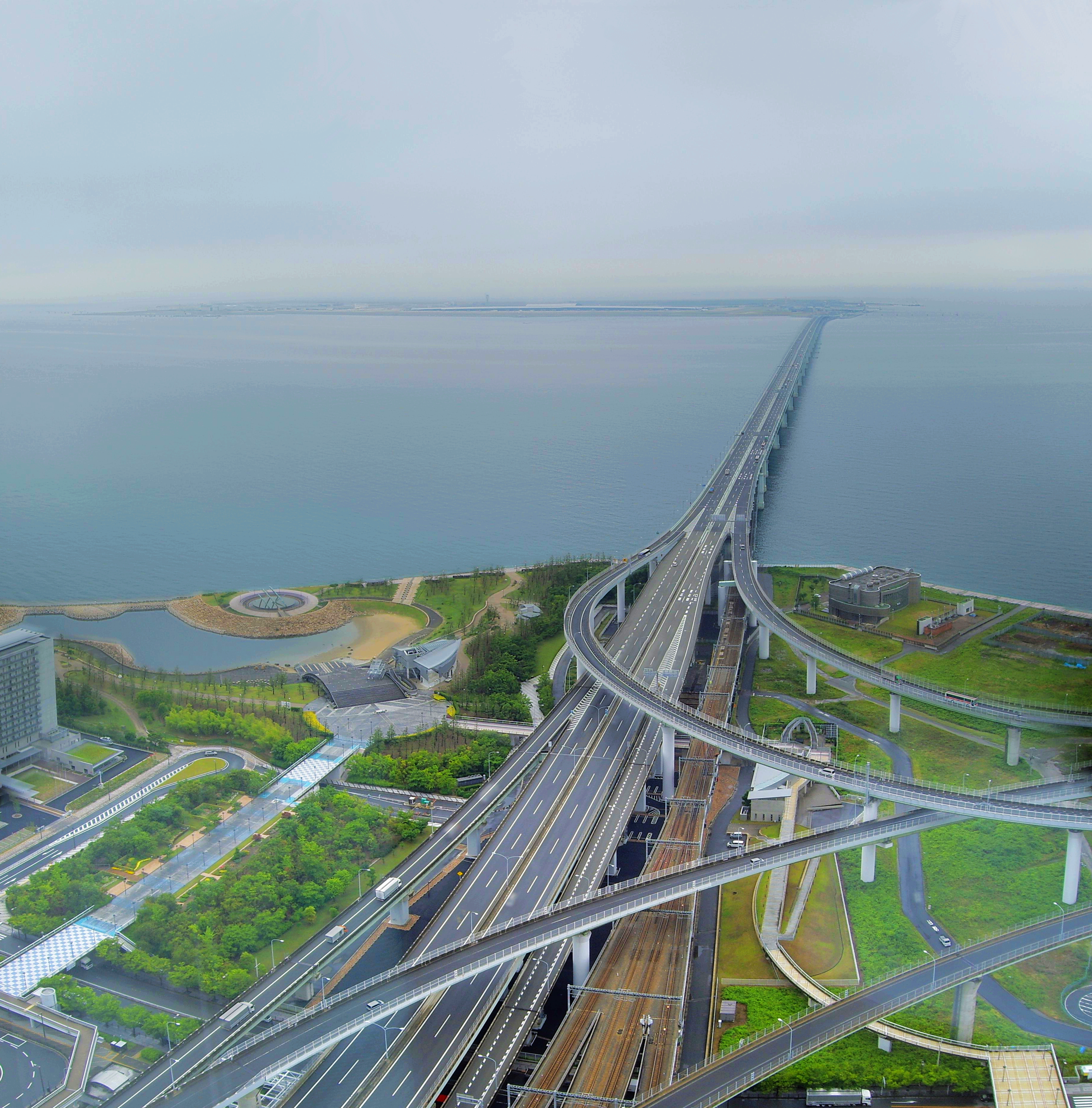 関西国際空港連絡橋（Skygate Bridge R）。大阪府泉佐野市。